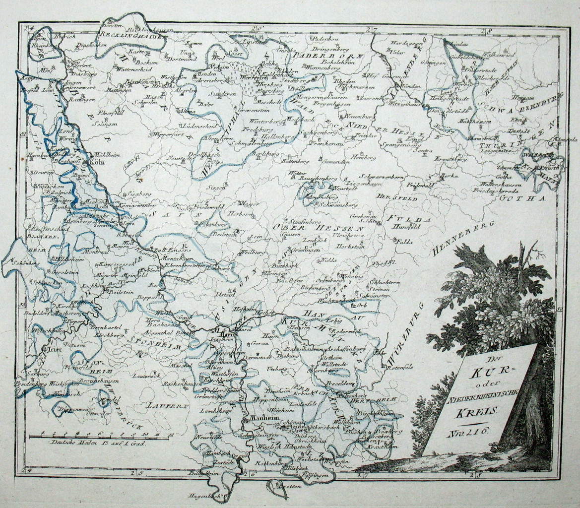 Der Kur- oder Niederrheinische Kreis. Nro. 216. Kolorierter Kupferstich